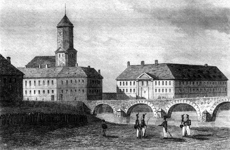 Image en provenance du livre : Eusèbe Girault de Saint-Fargeau, Guide pittoresque du voyageur en France, contenant la statistique et la description complète des quatre-vingt-six départements, orné de 740 vignettes et portraits gravés sur acier, de quatre-vingt-six cartes de départements et d'une grande carte routière de la France, par une Société de gens de lettres, de géographes et d'artistes, Paris, F. Didot frères, 1838, 6 volumes in-8° (BNF : 8-L25- 46). Volume III Didot frères, 1838. Route de Paris à Nice traversant les départements de l'Isère, des Hautes-Alpes, des Basses-Alpes et du Var. auteurs dessins : Rauch (ou autre) auteurs gravures : Skelton fils, Schroeder, Bishop (ou autre)